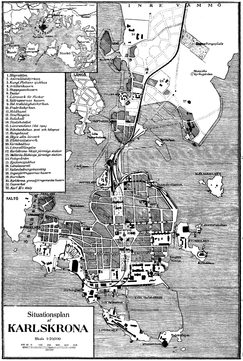 Karta över Karlskrona vid 1900-talets början (senast 1910).